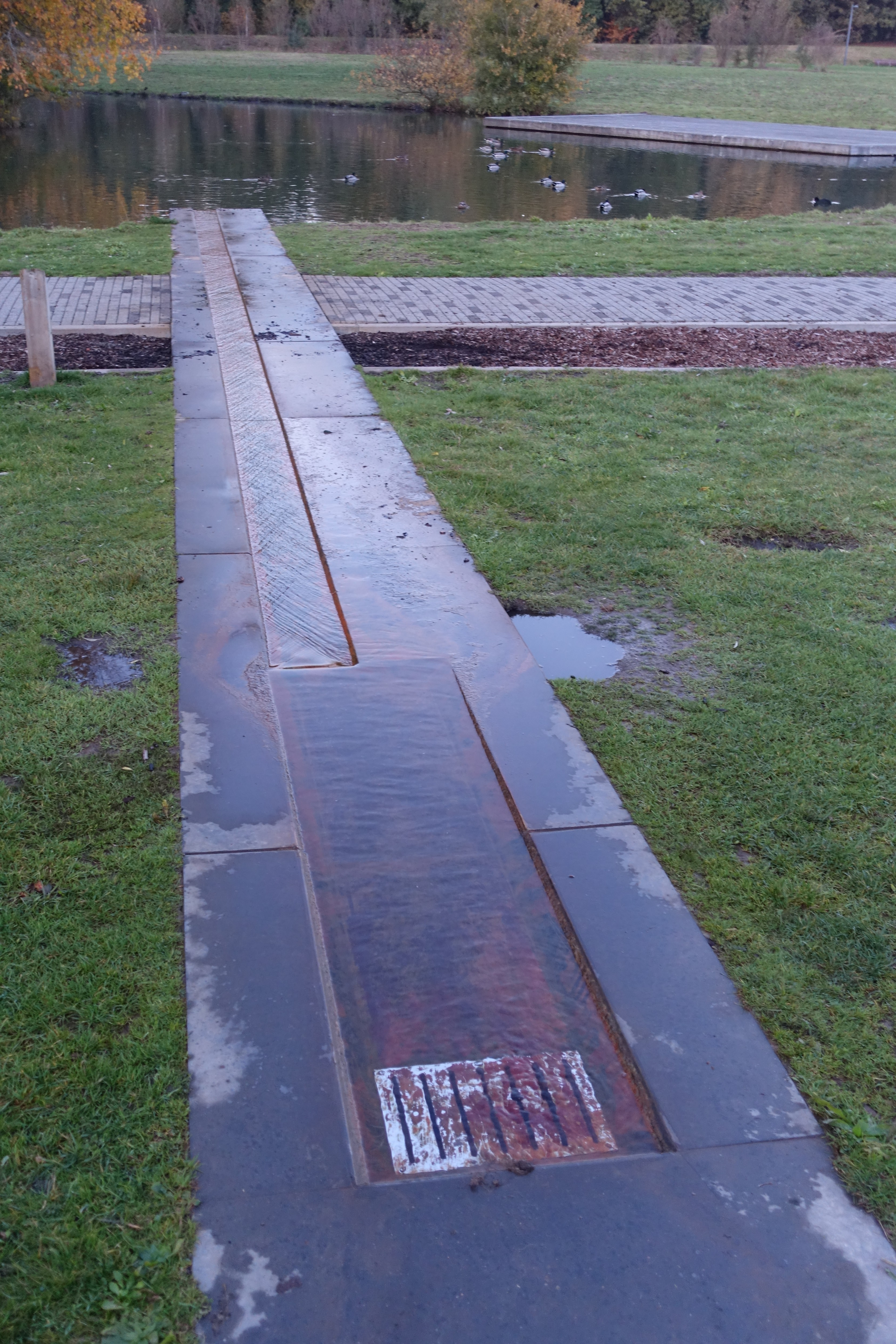 Pliniusbron in Tongeren, mogelijk al vermeld in de Romeinse tijd